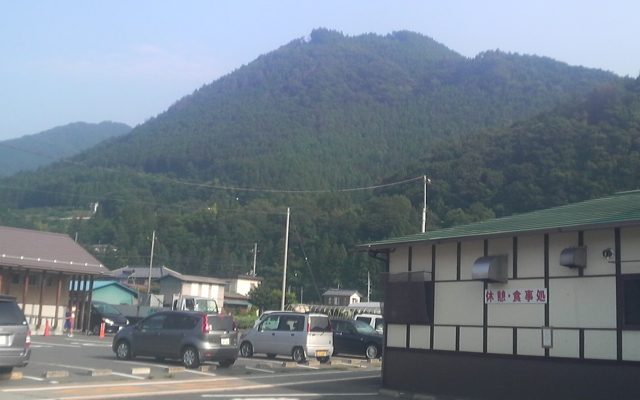 富士山、道の駅おのこより撮影。